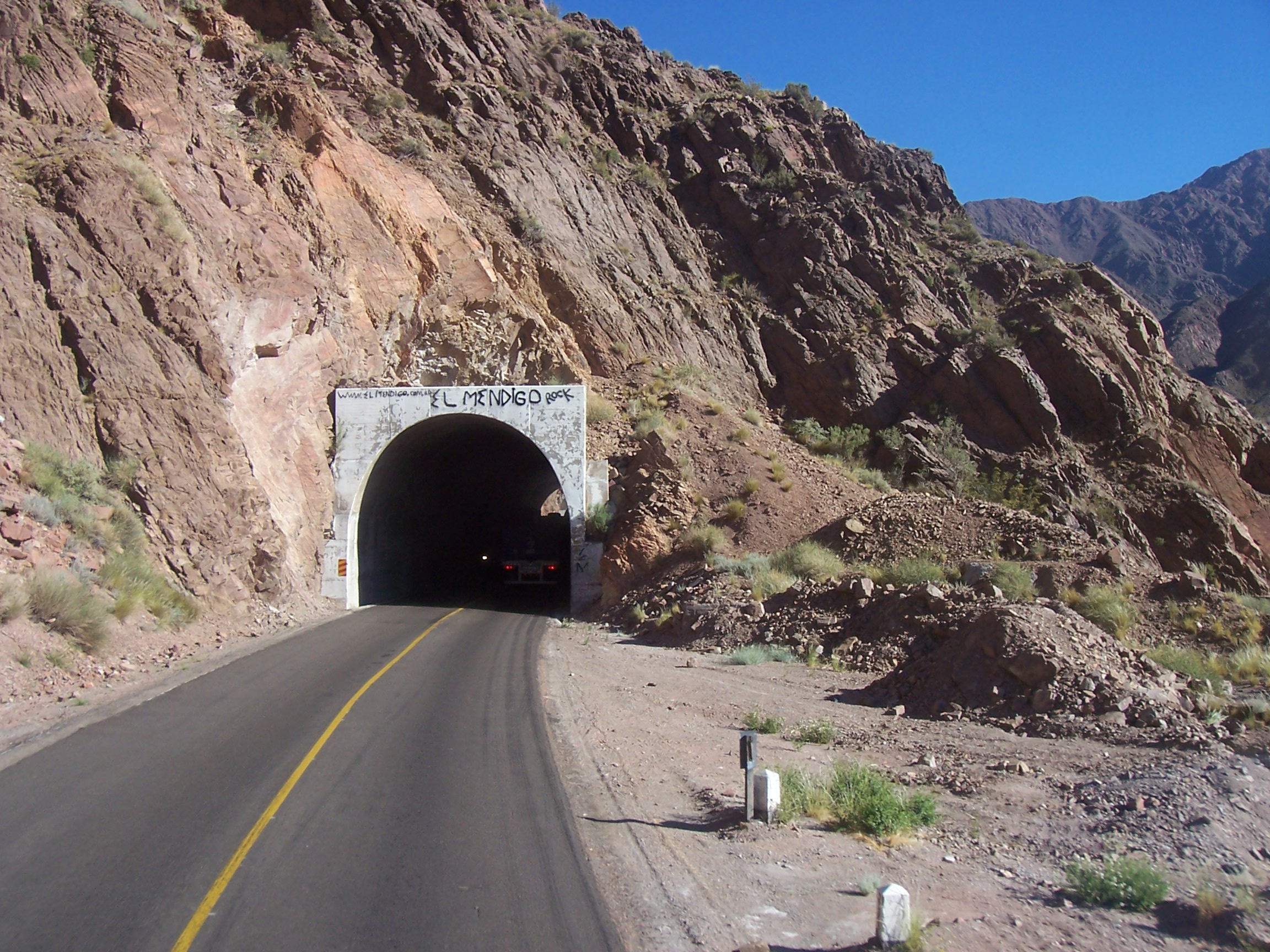 Tunel en la Ruta Nacional 7 en la provincia de Mendoza, Argentina.